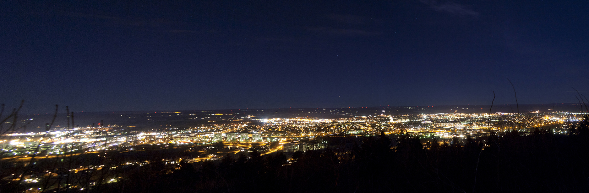 Skövde sett från Billingen på kvällen. Mars 2012.